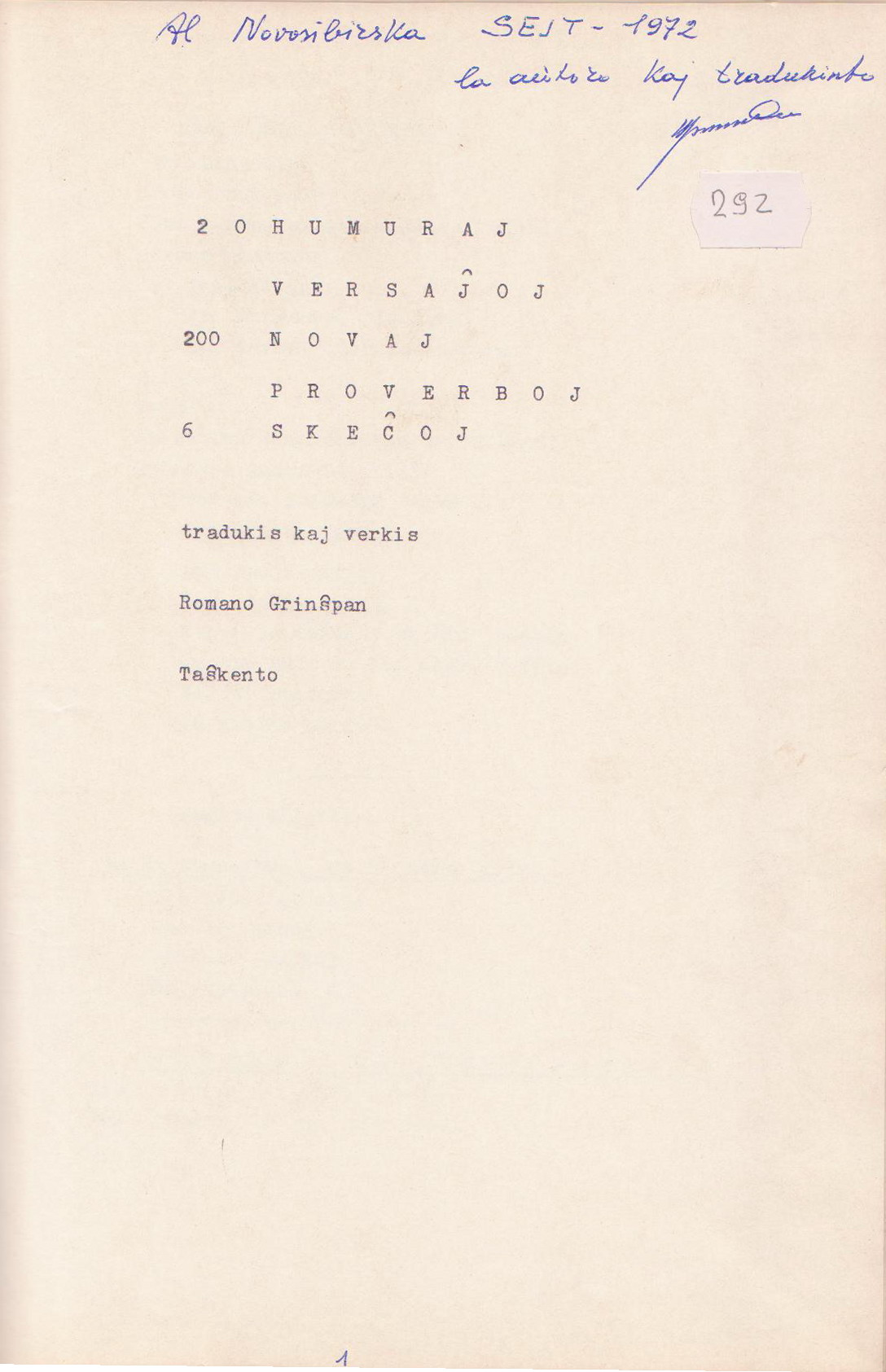 estas la kovrilo de la 20 humuraj versaĵoj